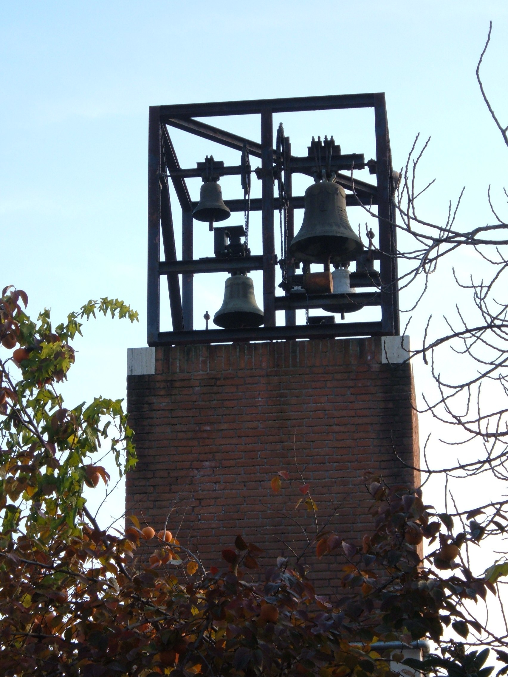 Chiesa di San Valentino, a Roma, nel quartiere Parioli (Villaggio Olimpico).